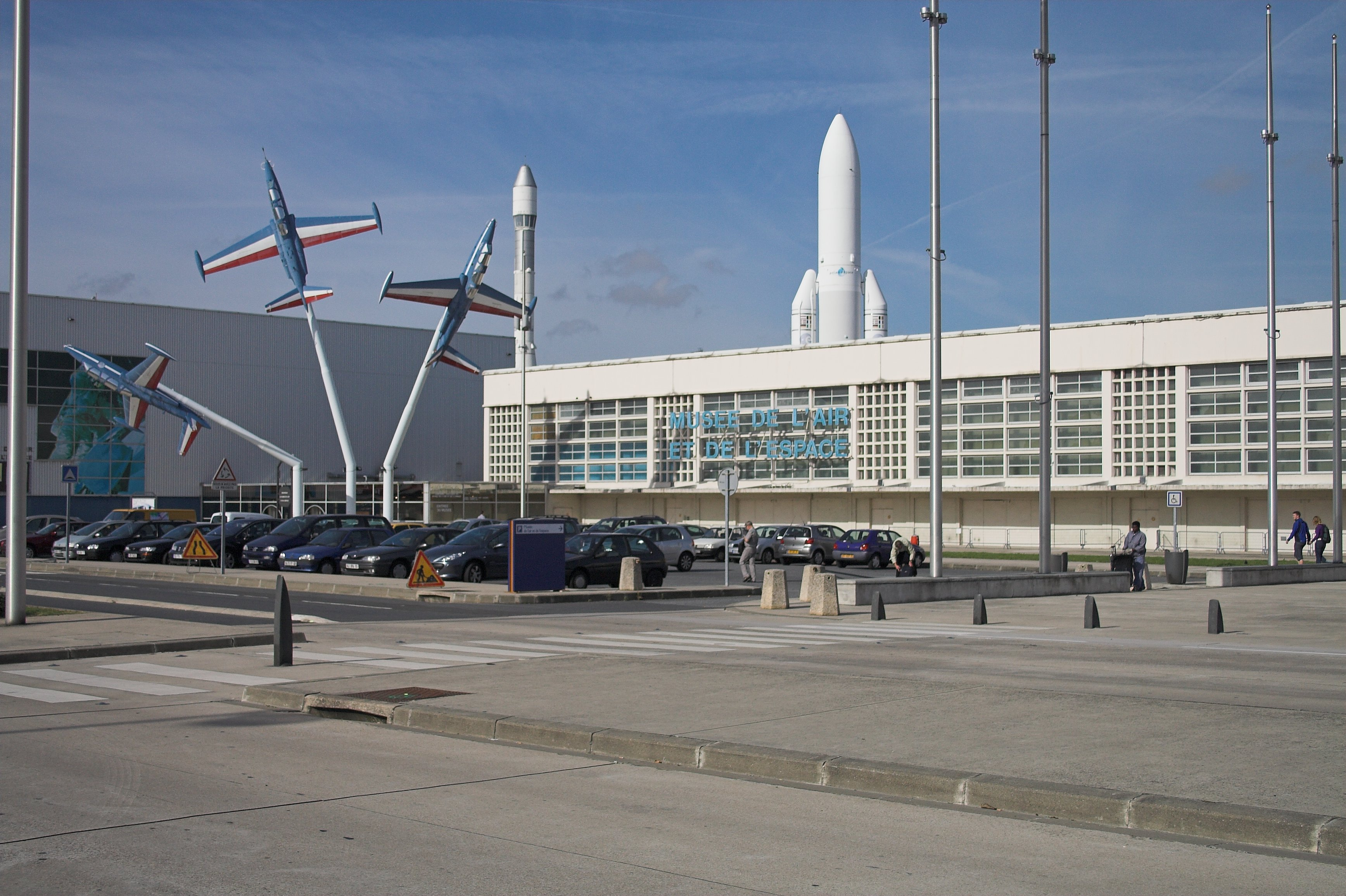 an entrance of the Museum of Air and Space(Musée de l'air et de l'espace, Le Bourget, France)